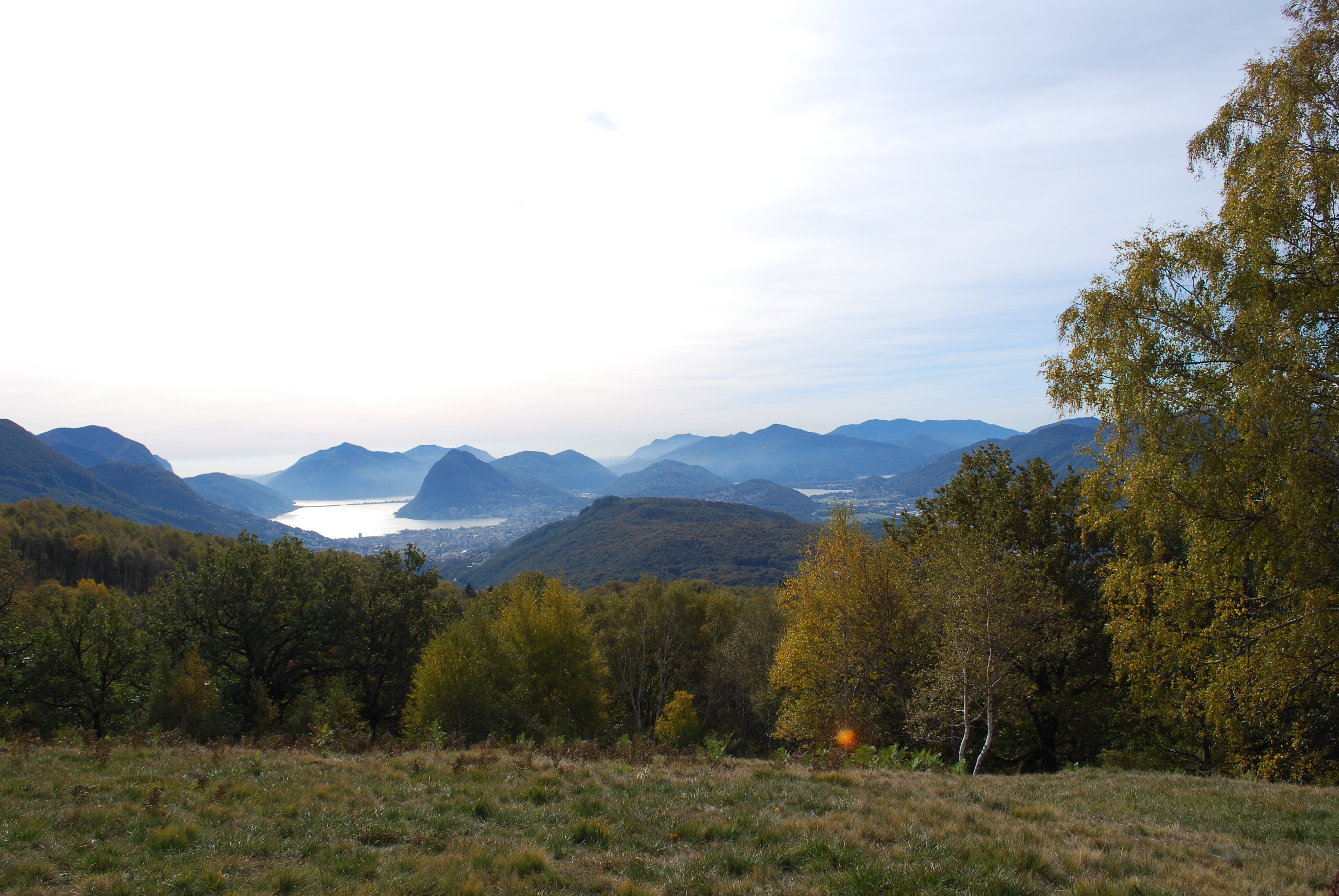 Il Luganese visto dai M.ti di Roveredo